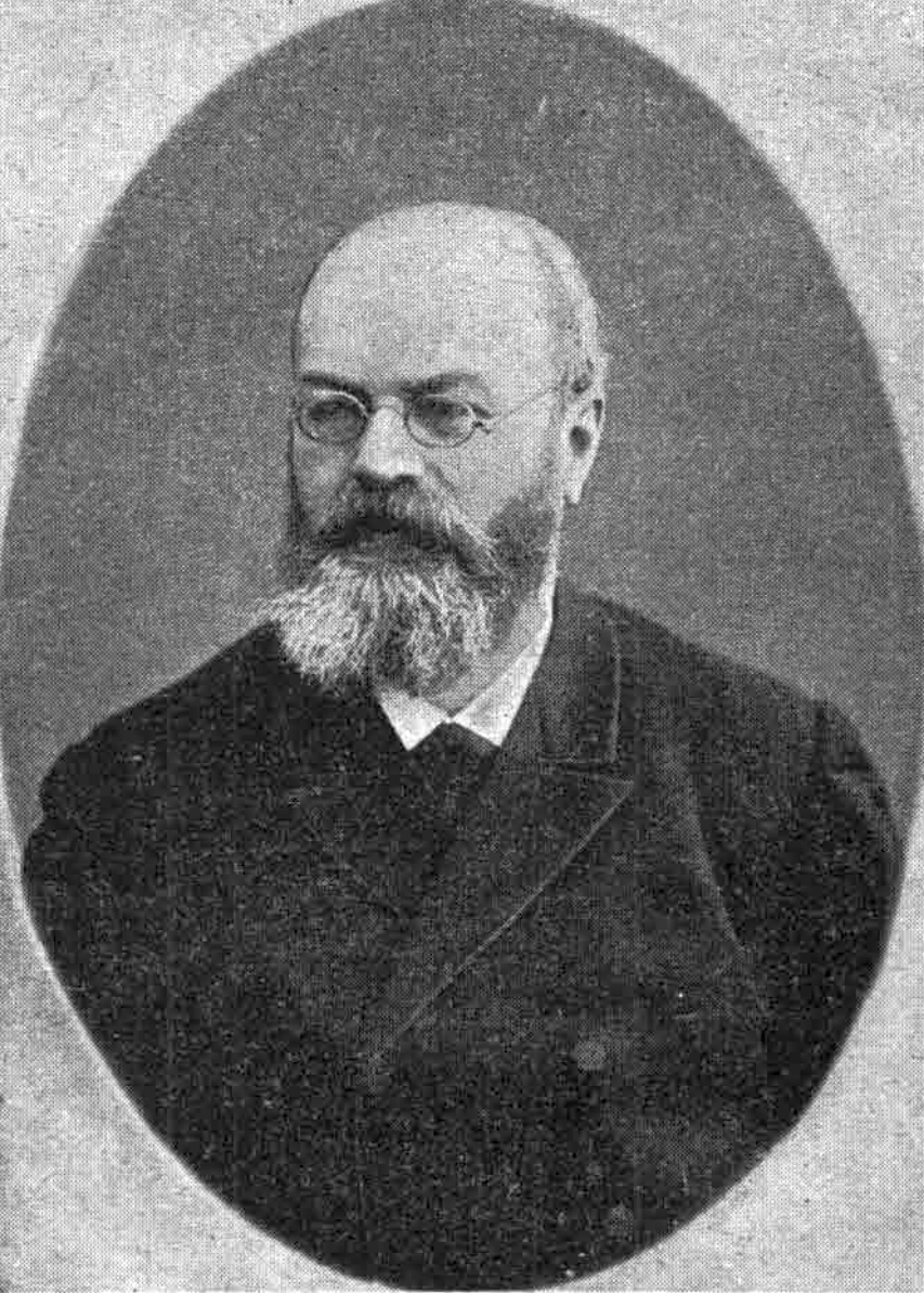 Сент-Илер, Карл Карлович